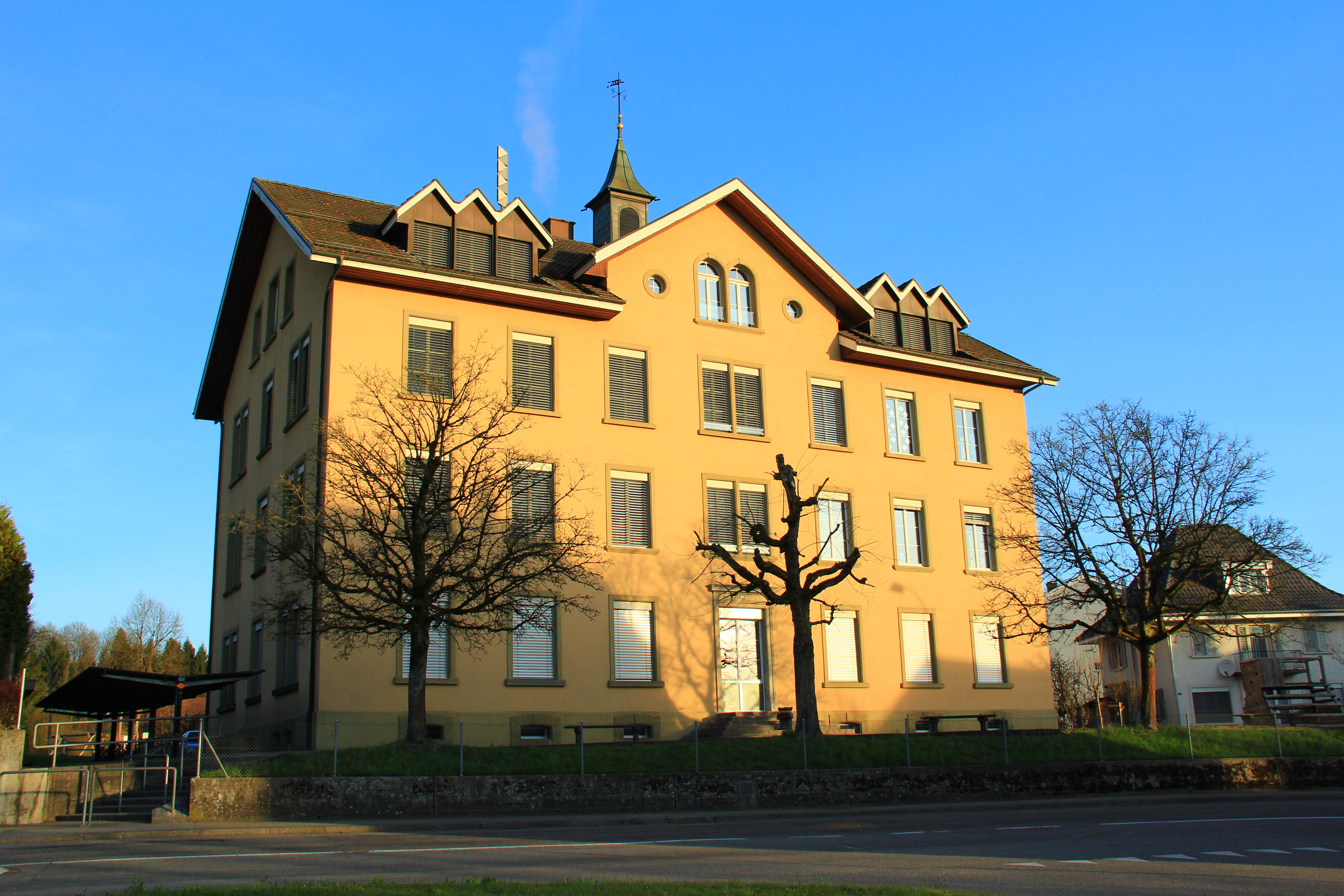 Schulhaus Vordemwald, erbaut 1895